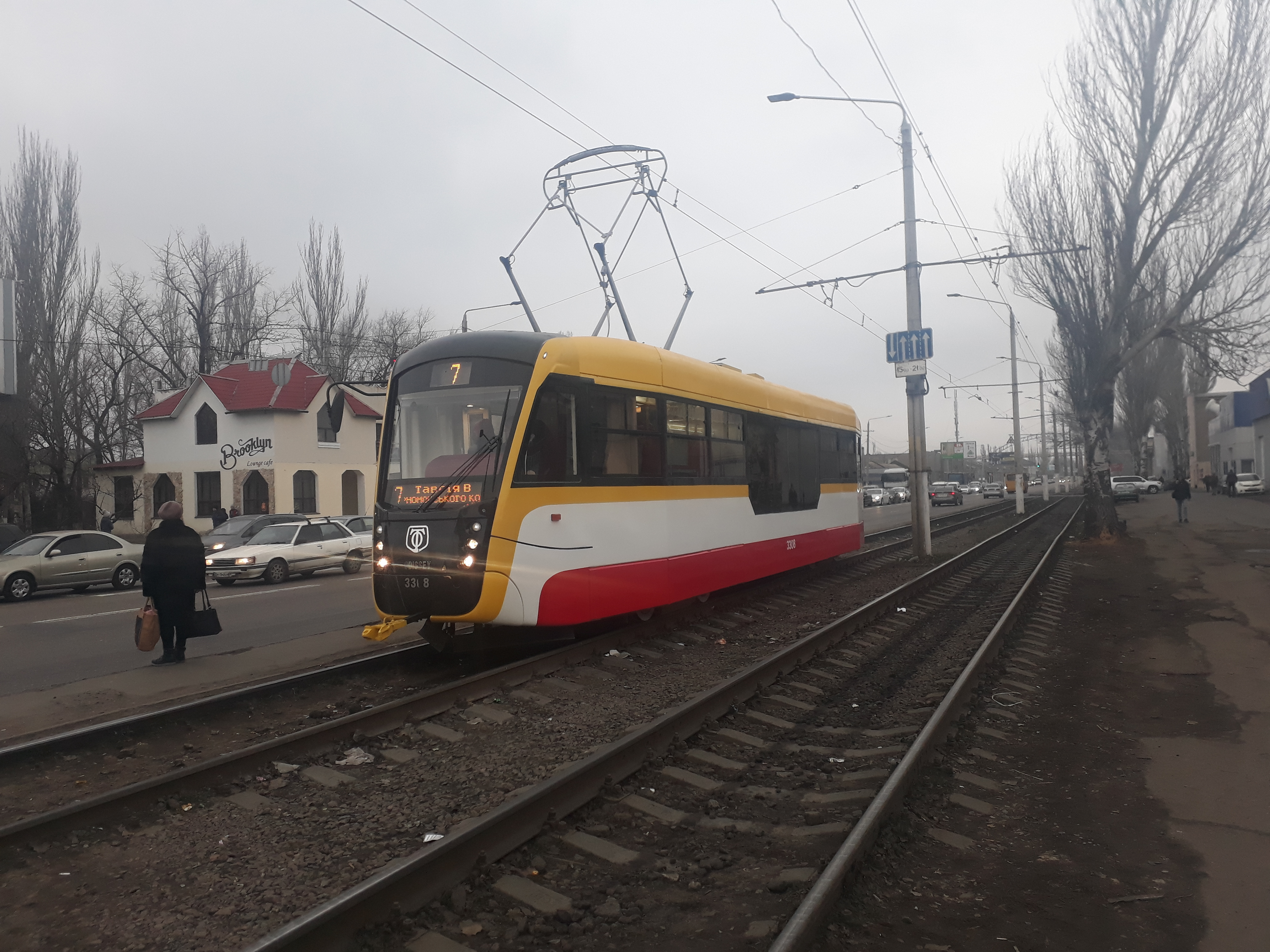 трамвай Одиссей №3308 на Николаевской дороге